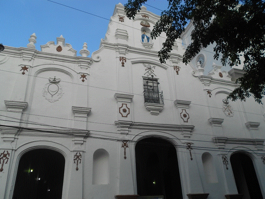 Catedral Metropolitana